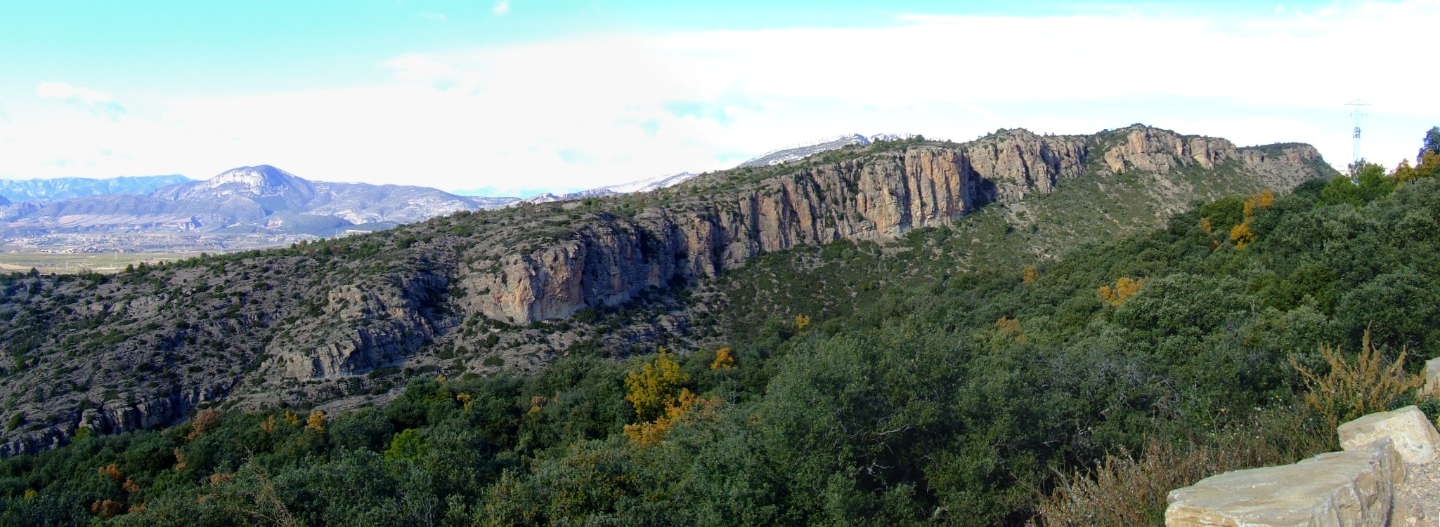 La Sadella des de Siall (Abella de la Conca i Isona i Conca Dellà, Pallars Jussà)